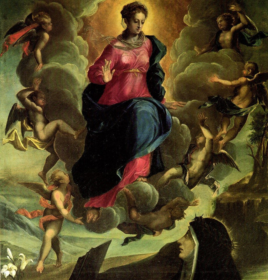 L'Assunta con la Beata Osanna Andreasi by Ippolito Andreasi (Andreasino) (Mantova, 1548 - 1608)